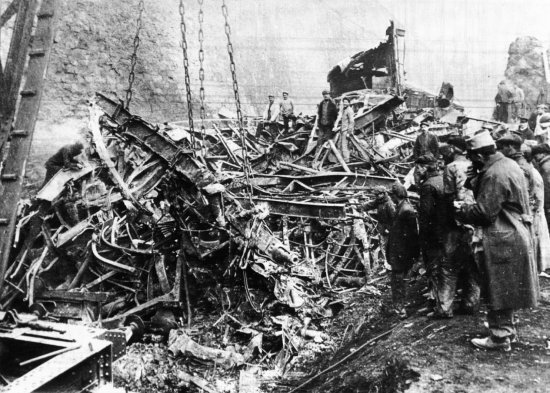 Крушение в Сен-Мишель-де-Морьен